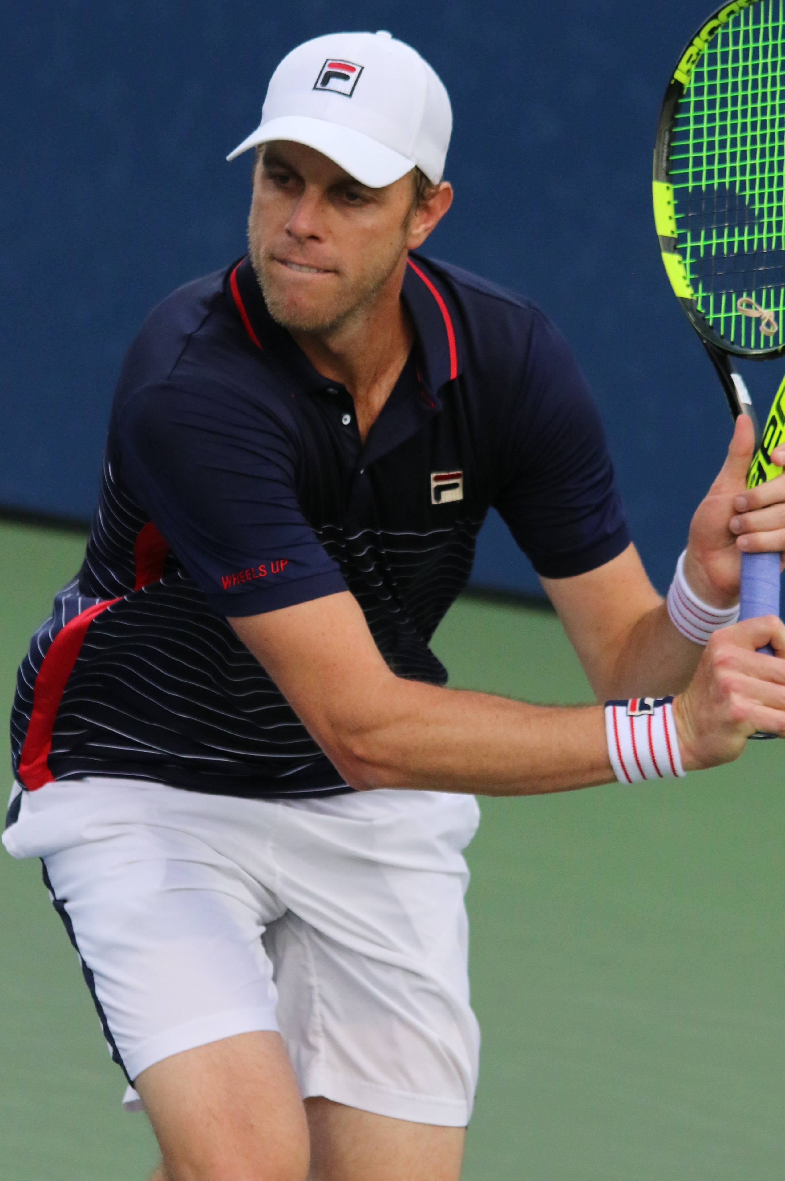 Querrey US16 (43)